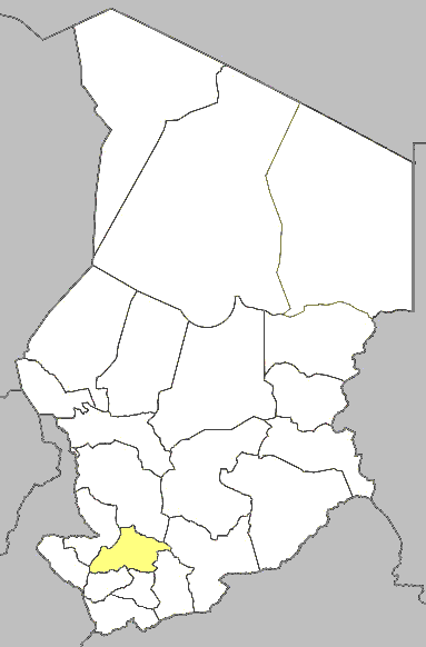 Mappa della diocesi di Lai, in Ciad.